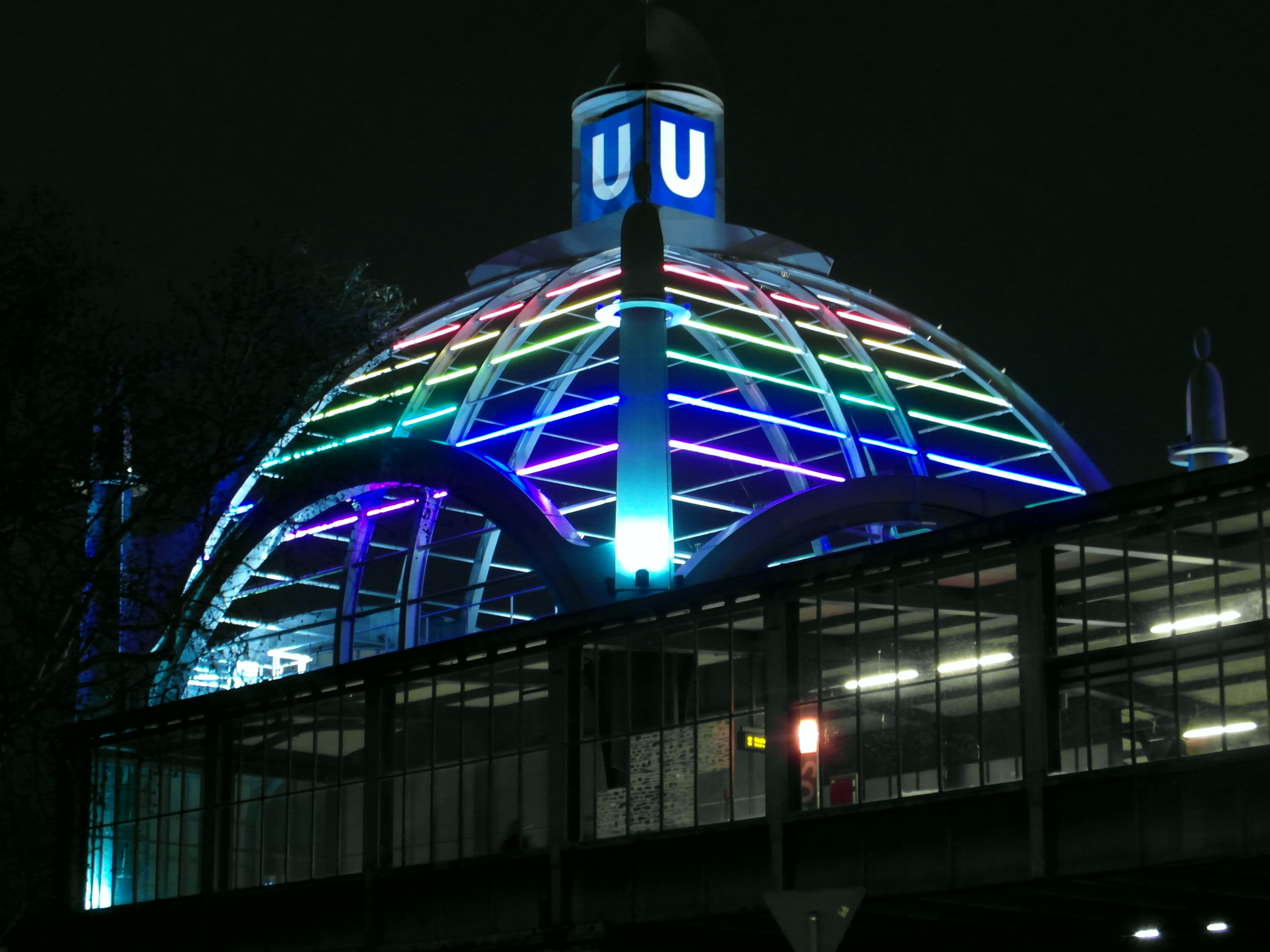 Linien U1, U2, U3, U4 Im Rahmen der in Schöneberg organisierten Aktion "Lichter im Regenbogenkiez – Lichter für Toleranz und Vielfalt" erstrahlt der U-Bahnhof Nolledorfplatz für zwei Monate (Dezember 2013 - Januar 2014) nachts in Regenbogenfarben. Anfang 2015 wurde die Regenbogenbeleuchtung wieder aktiviert und soll bis 2019 erstrahlen.